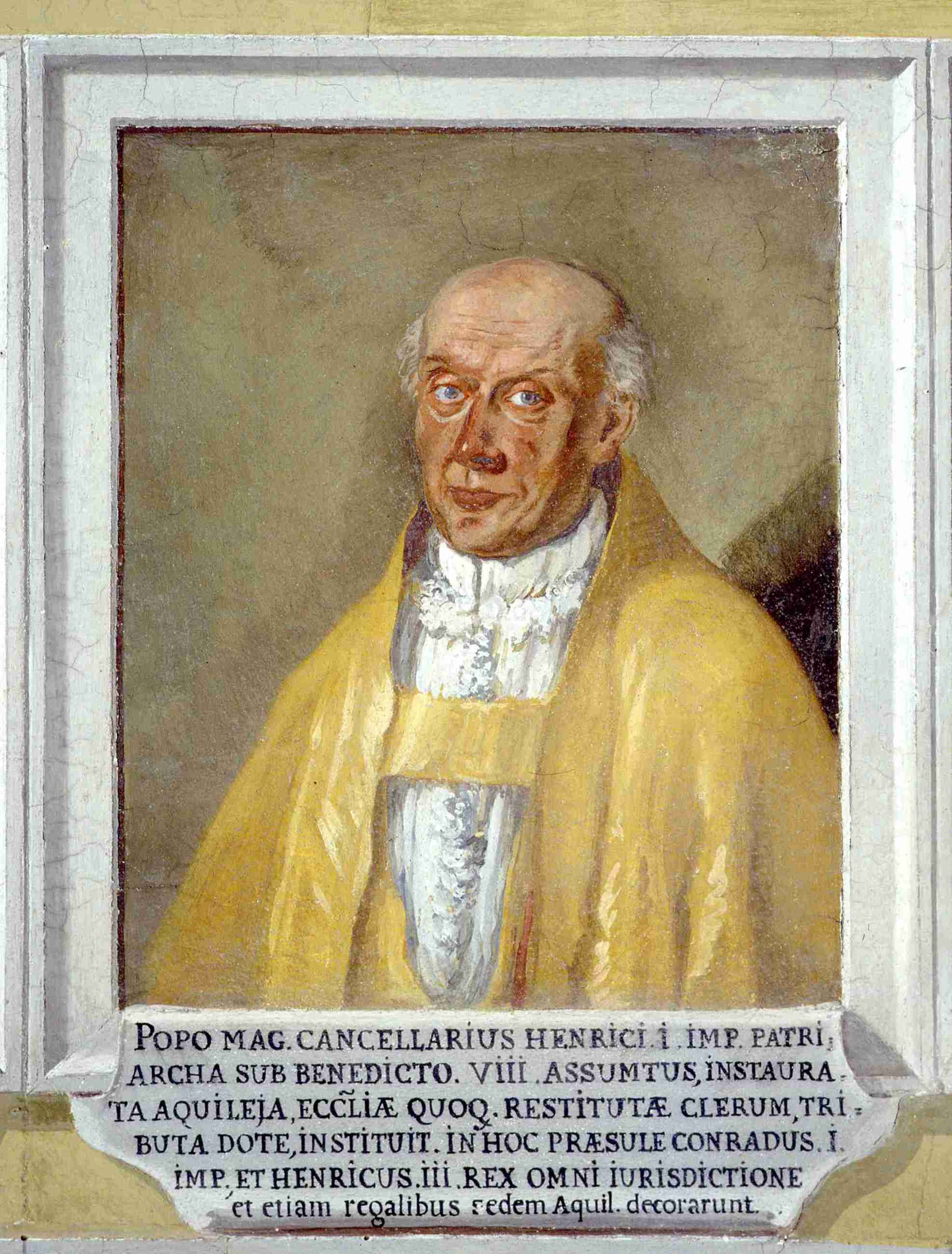 Poppone - Patriarcato Udine